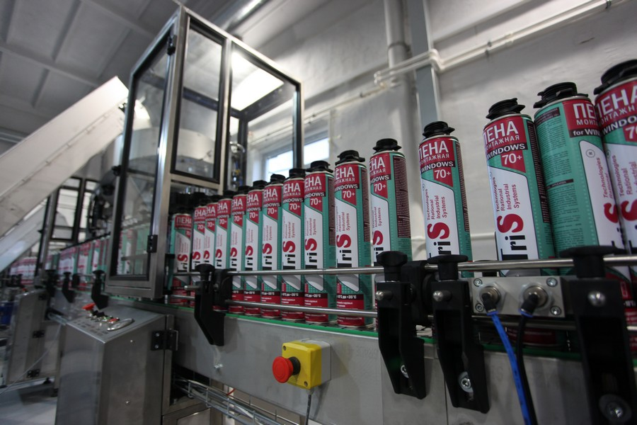 Производство монтажной пены под торговой маркой «TriS»